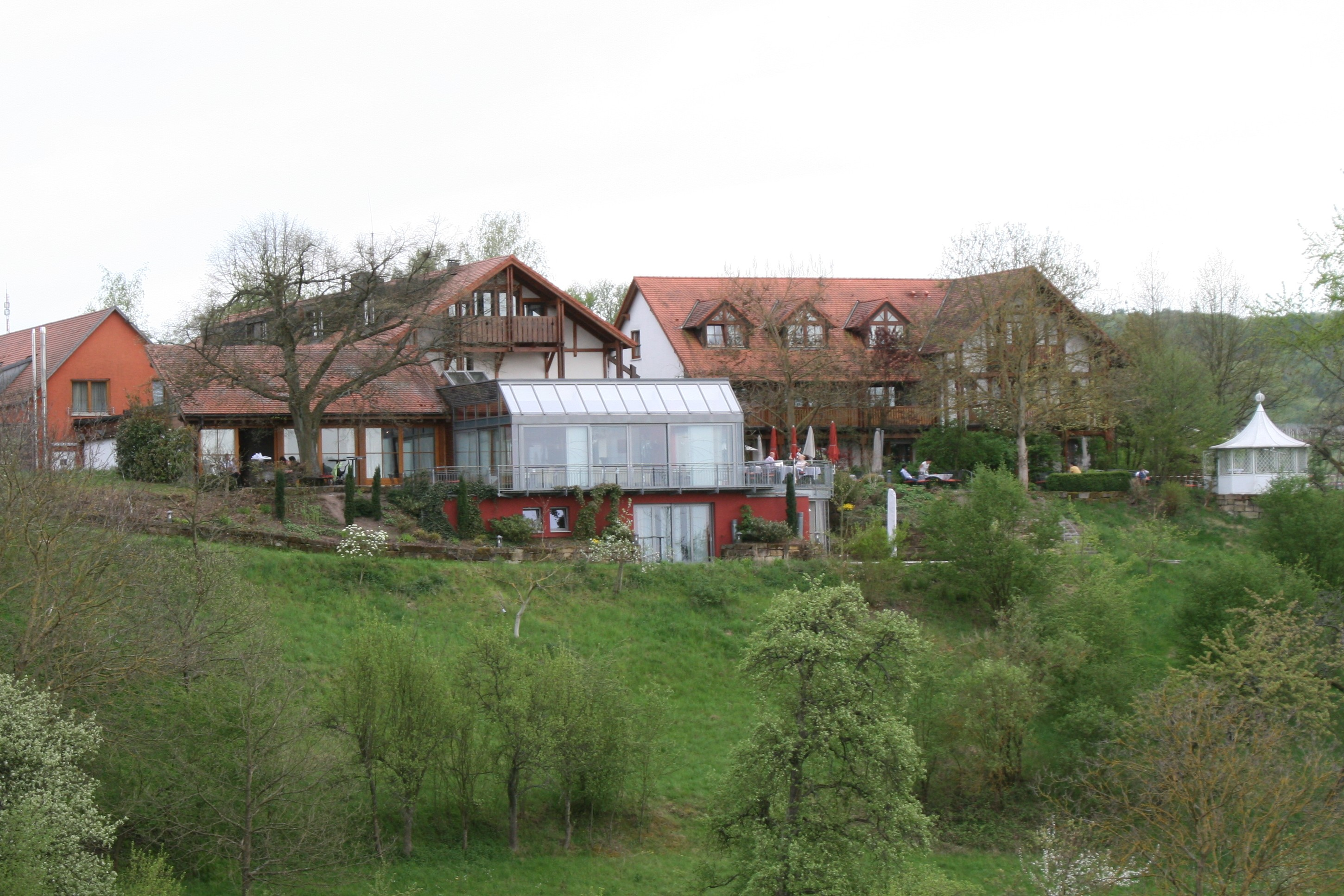 Der Rappenhof in Weinsberg vom nordwestlich gelegenen Hüttberg aus fotografiert